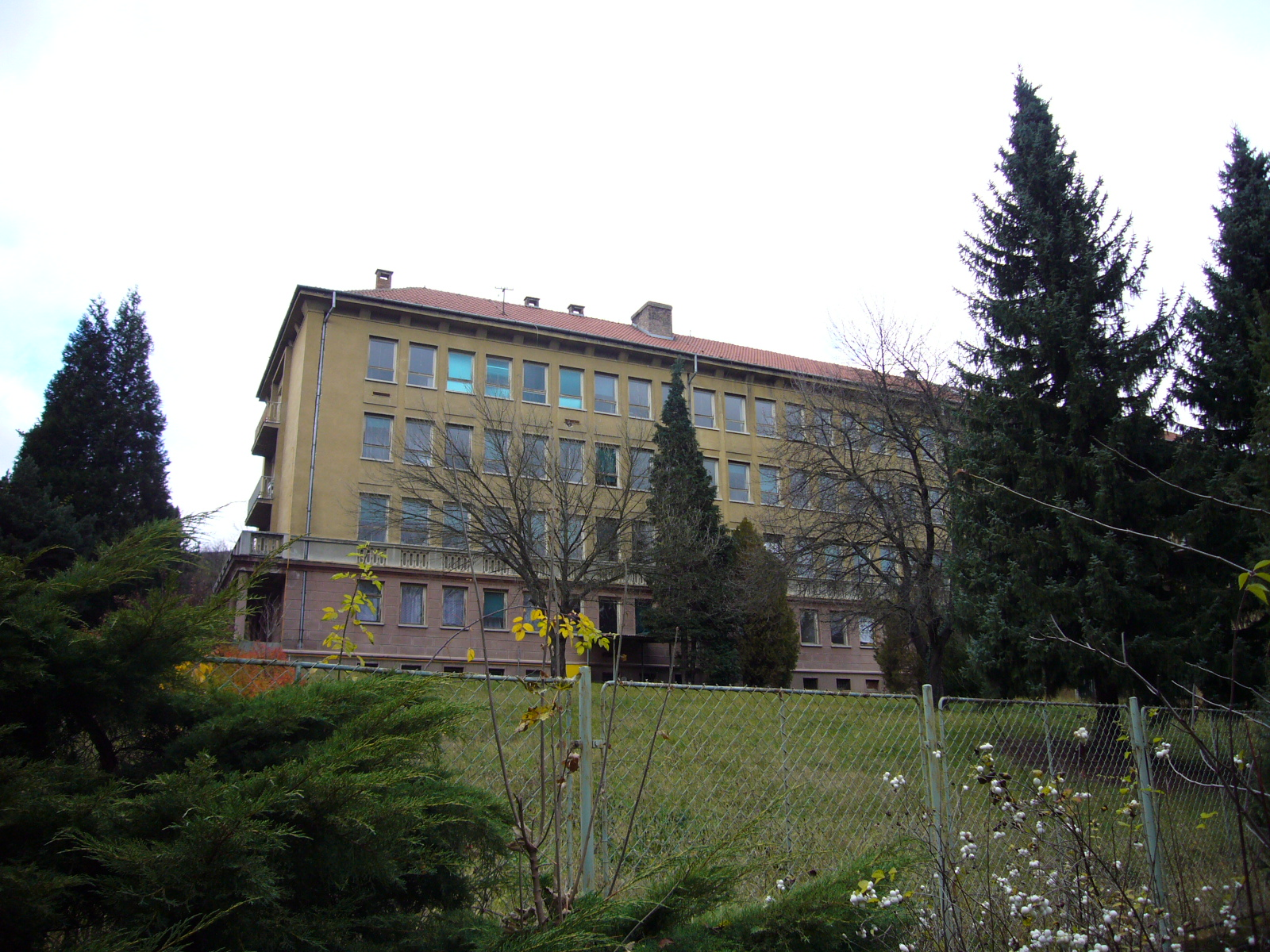 Pohľad na dominantný lôžkový monoblok.